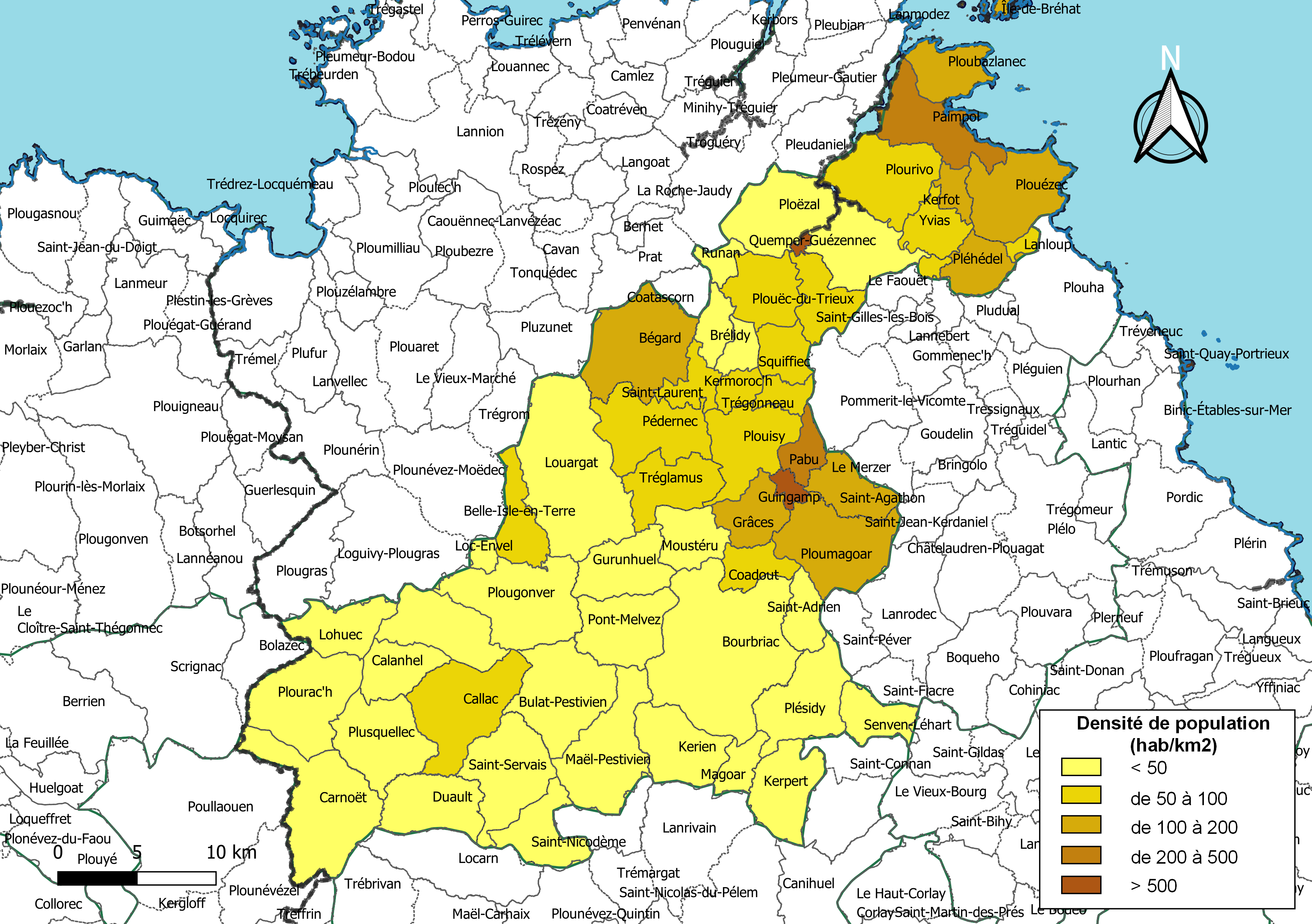 Carte des densités de population (millésimée 2016) des communes de l'intercommunalité Guingamp-Paimpol Agglomération, département des Côtes-d'Armor, France. Composition au 1er janvier 2019.